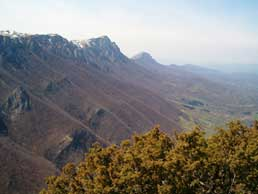 Foreland of Suva planina mountain in Summer, Serbia/La chaine de montagne de la Suva Planina en été, Serbie